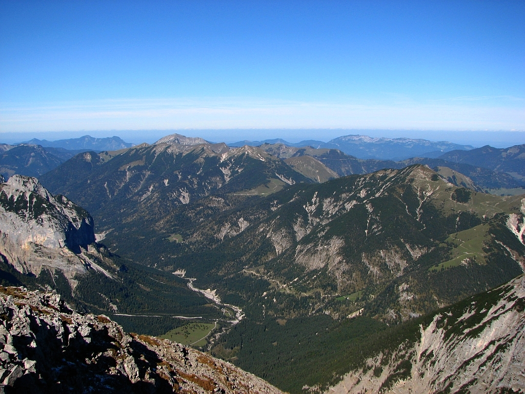 Der Kompar im Vorkarwendel / Grasbergkamm